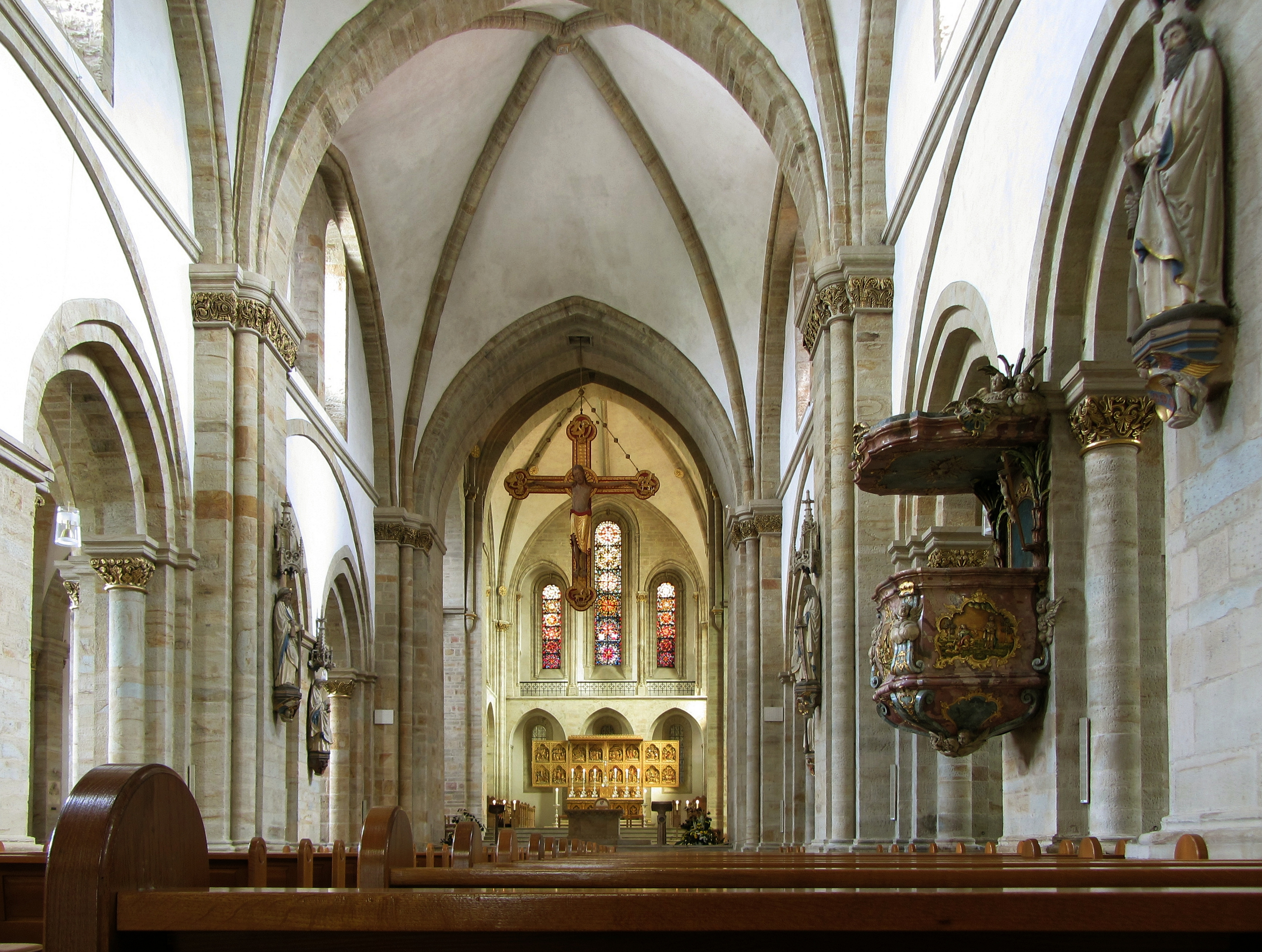 Osnabrück. Dom St. Peter, Innenraum.